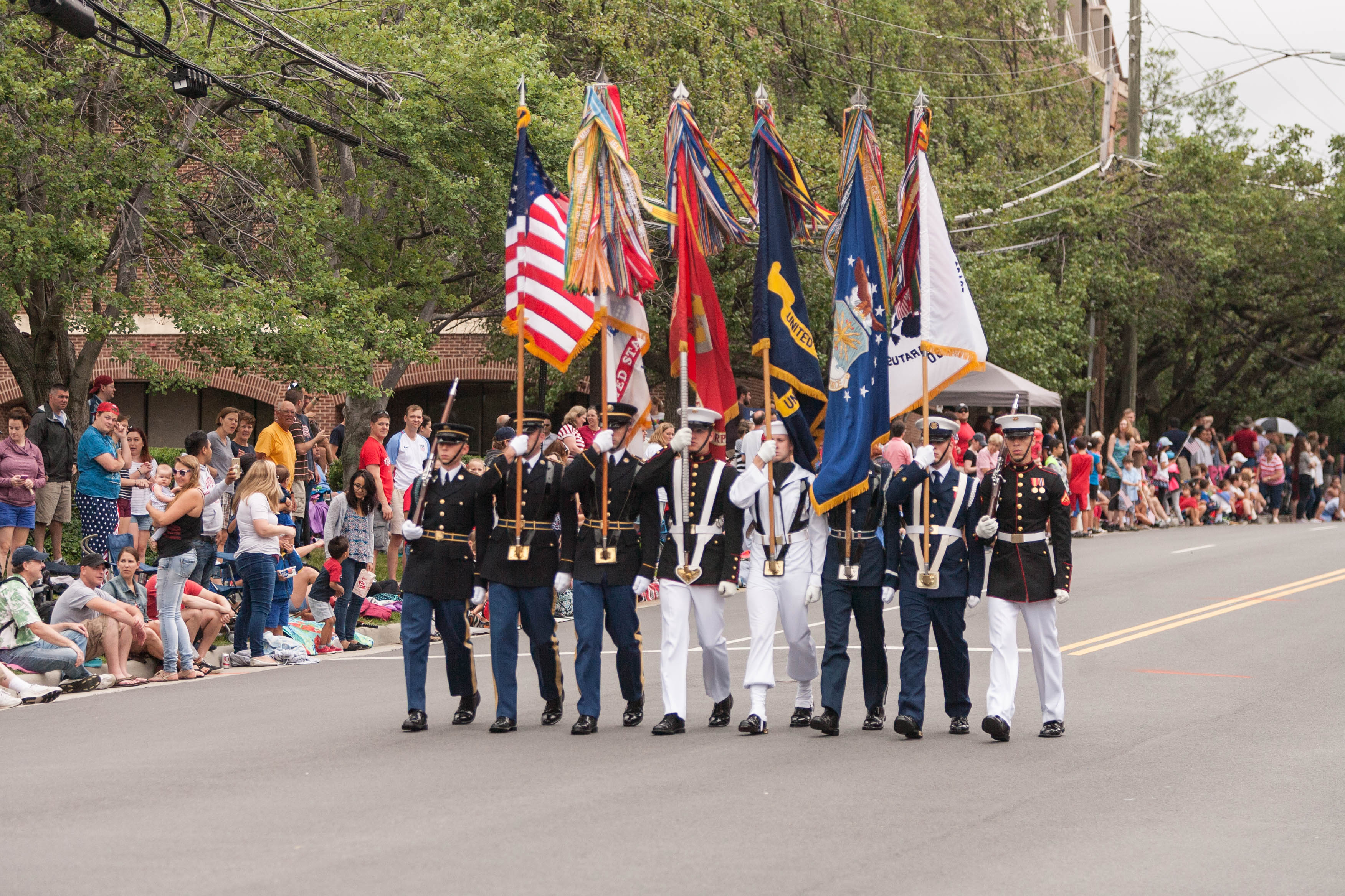 QD3J0015.jpg